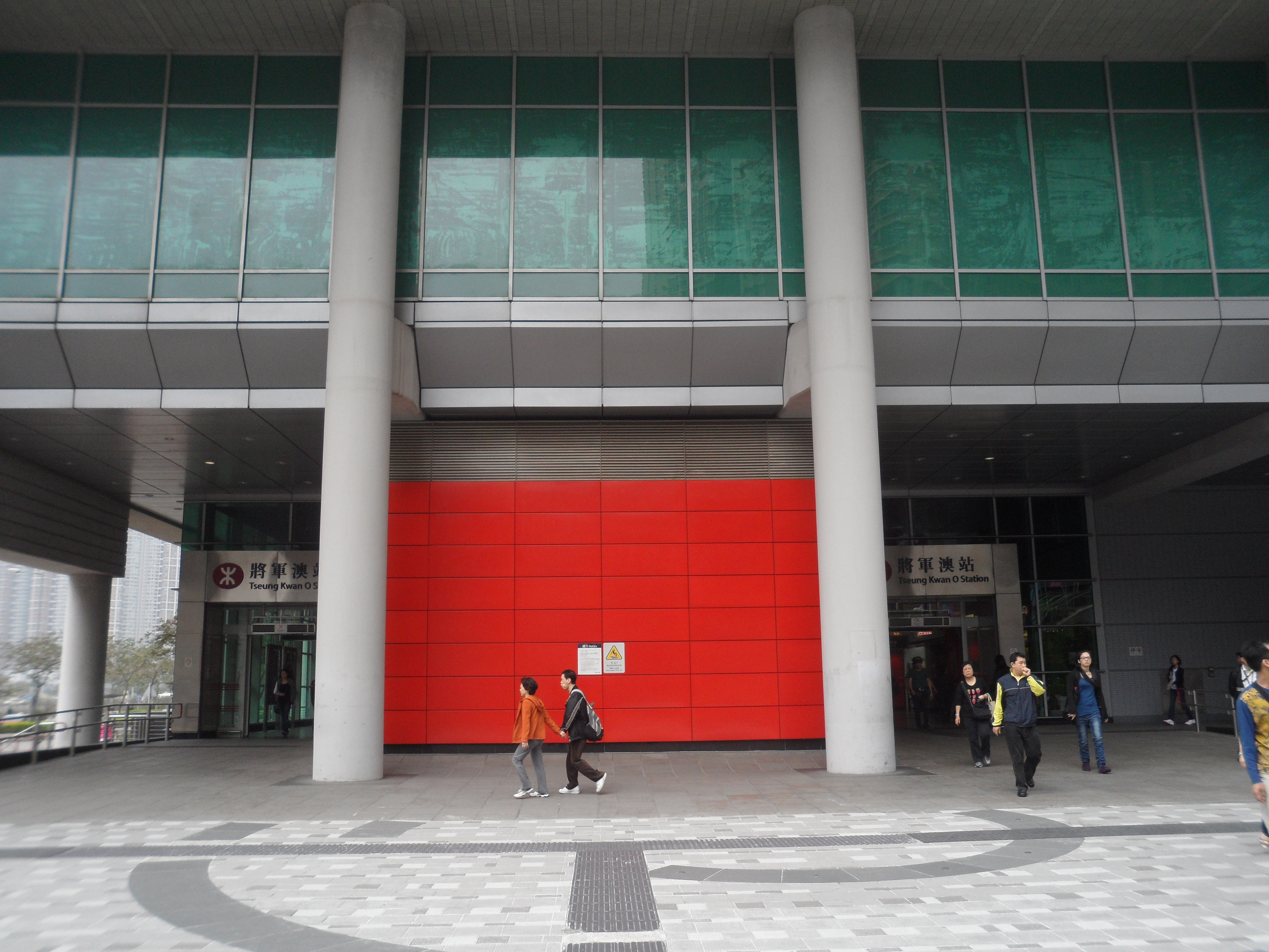 港鐵將軍澳站A出口